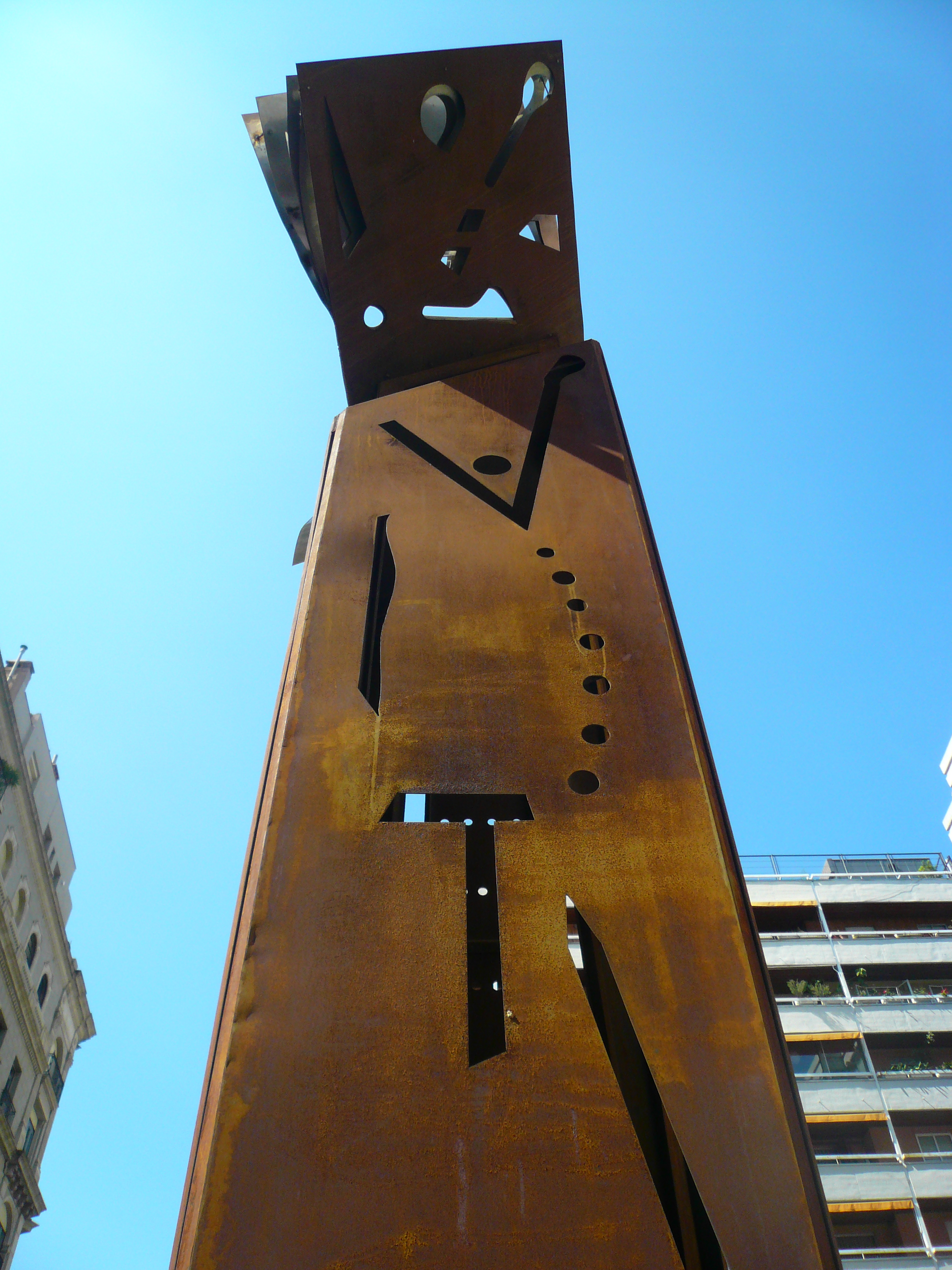 Al llibre, Sur le livre. C. Moià, 5, Institut Francès (Barcelona). Escultor: Josep Guinovart, signada. Material: acer corten i acer inoxidable. 1992. 08″ N, 2° 09′ 06.34″ E